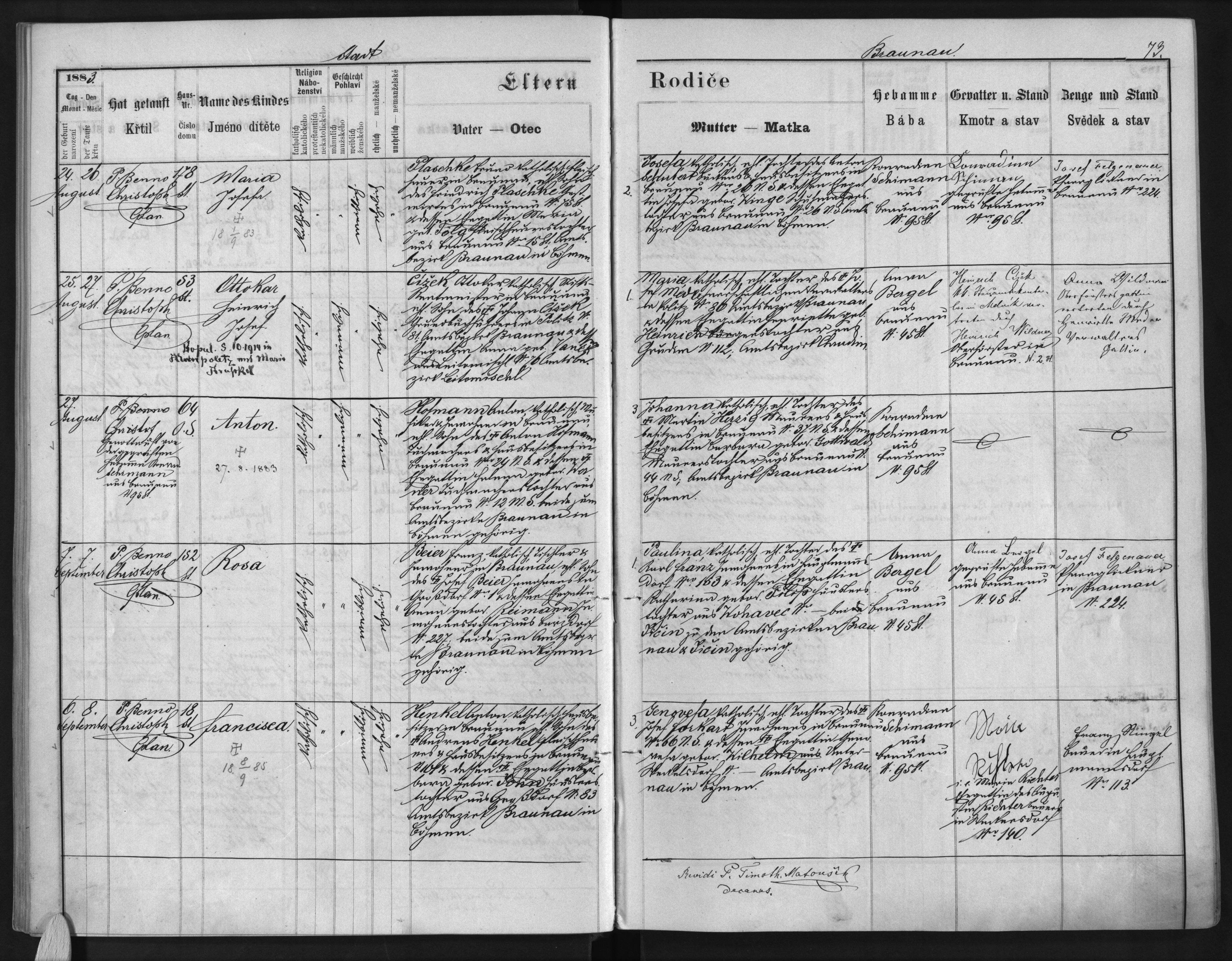 matriční záznam o narození a křtu